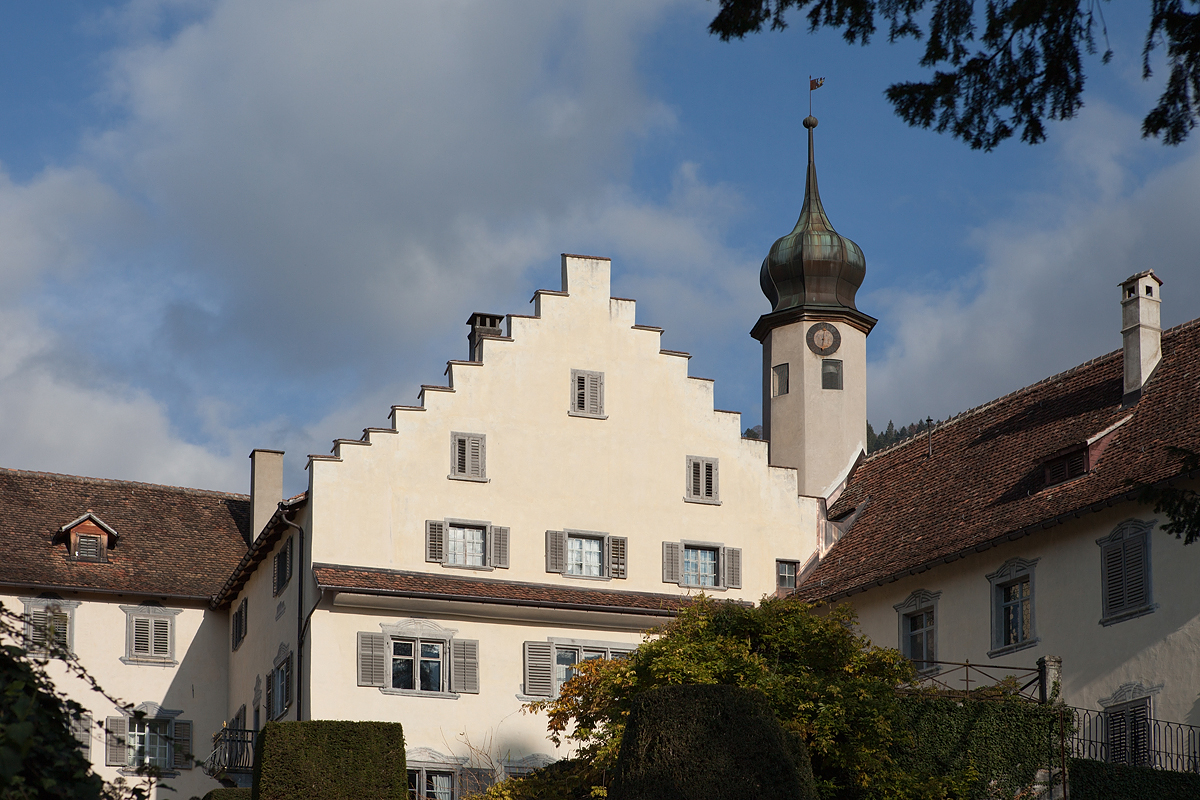 Schloss Bothmar (privat) in Malans